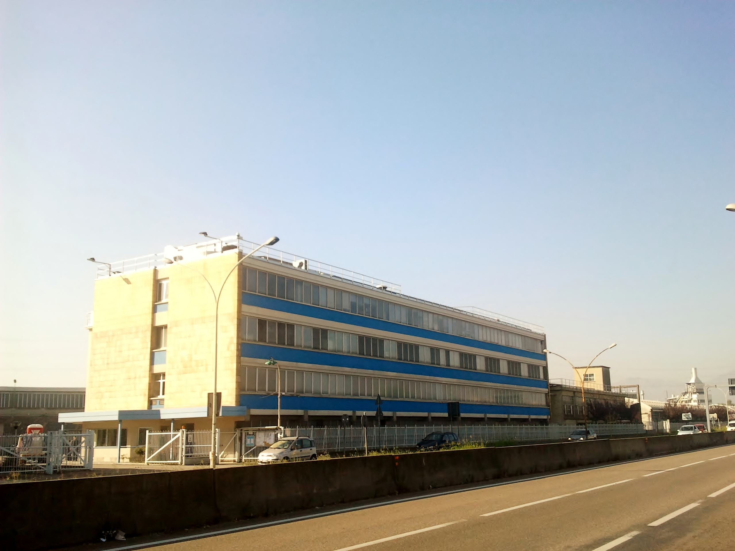 Carrozzeria Bertone. Torino. Italy